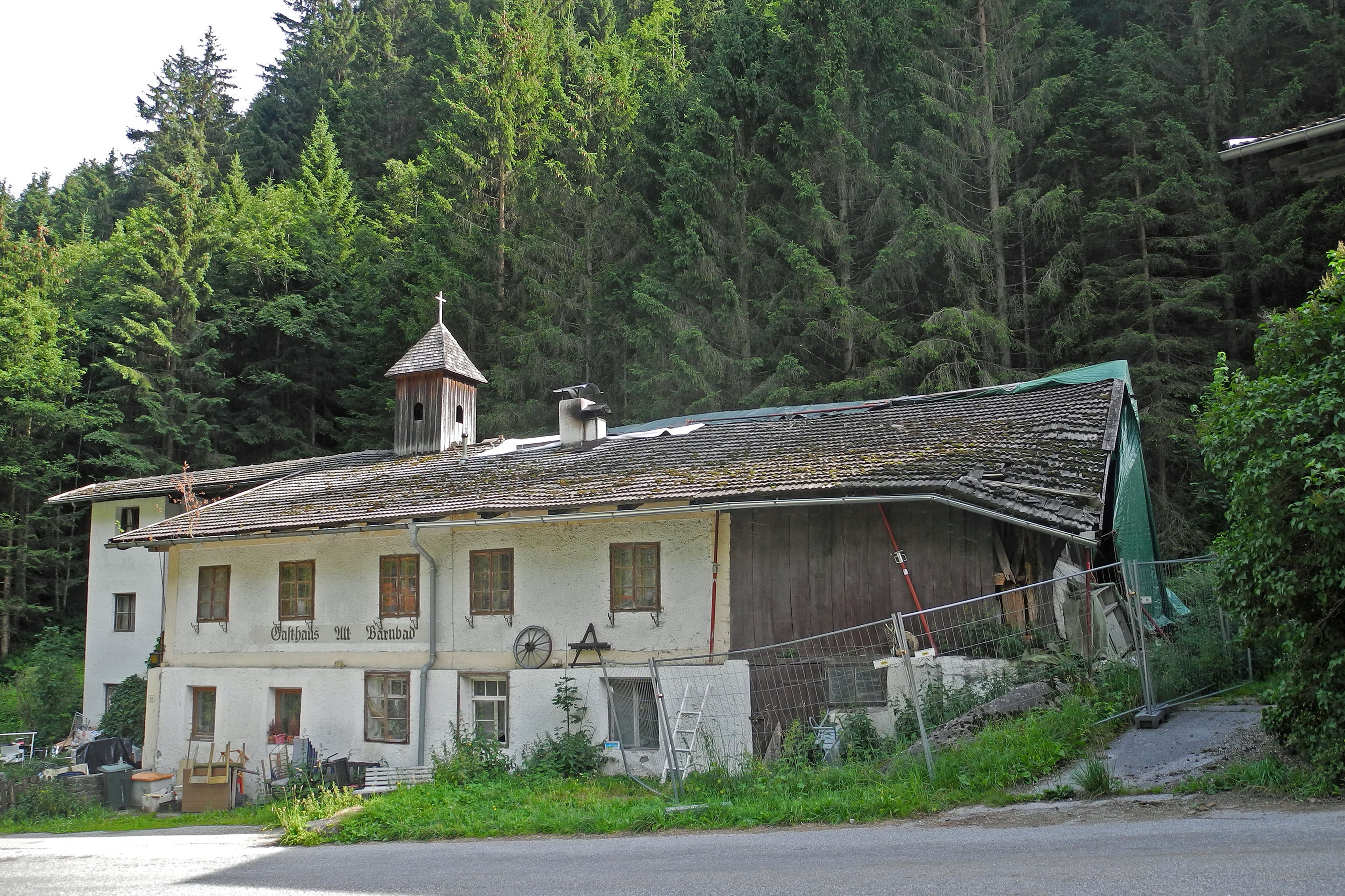 Weiler Bärenbad im Oberbergtal - ehem. Gasthaus Alt-Bärenbad